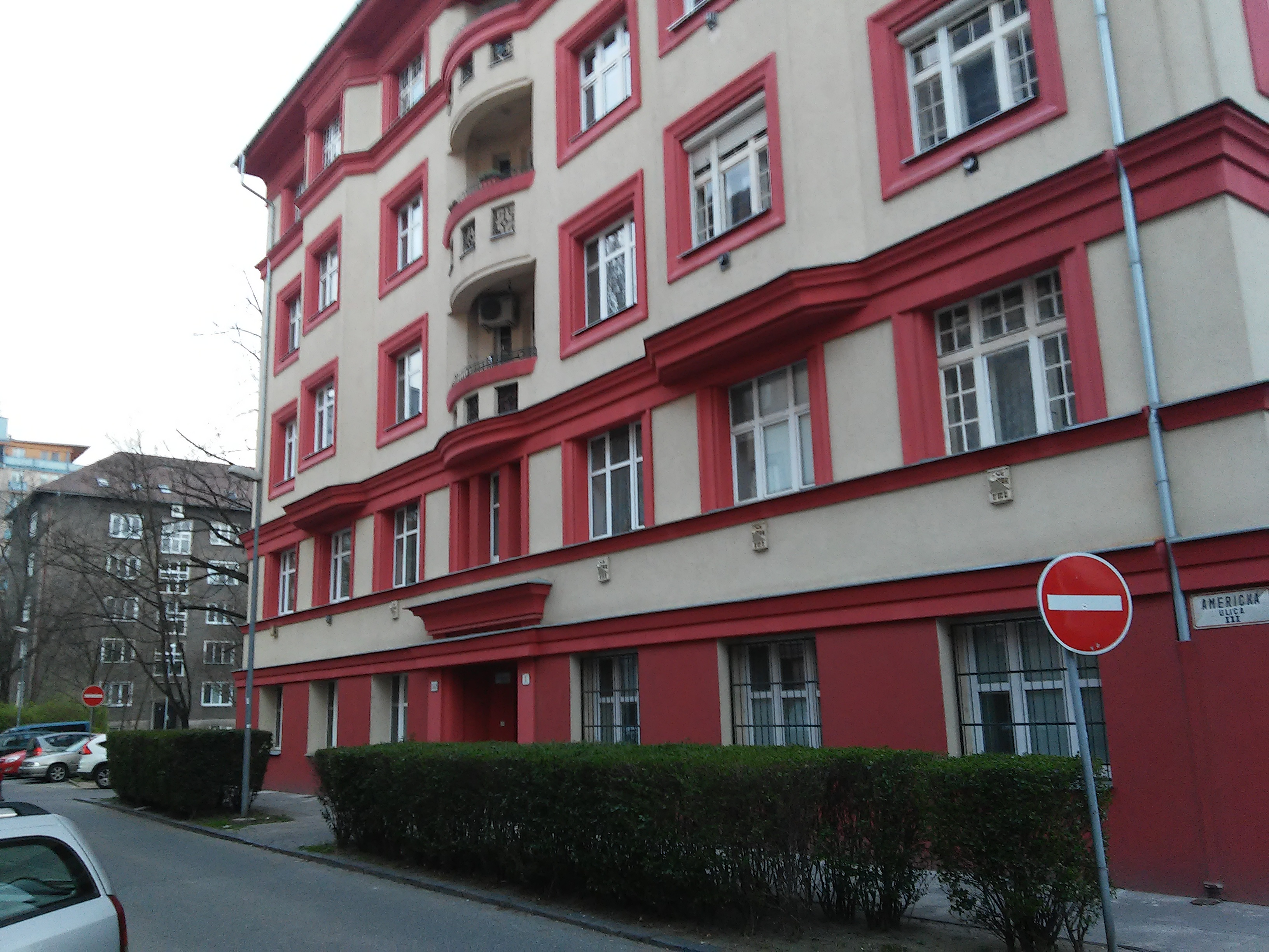 Americká, Bratislava